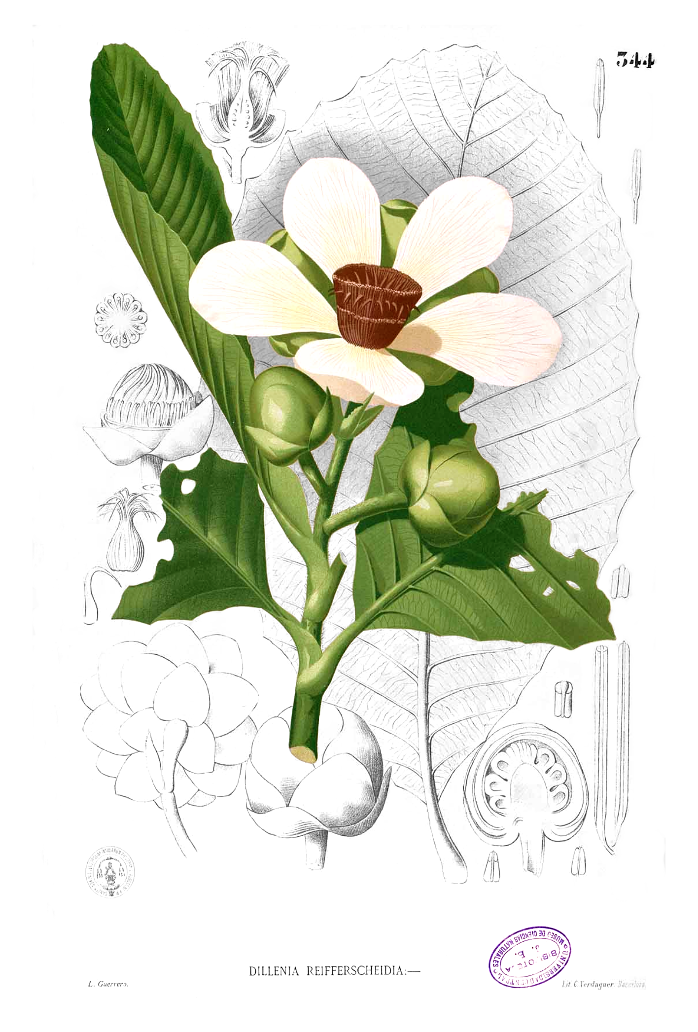 Dillenia reifferscheidia Plate from book